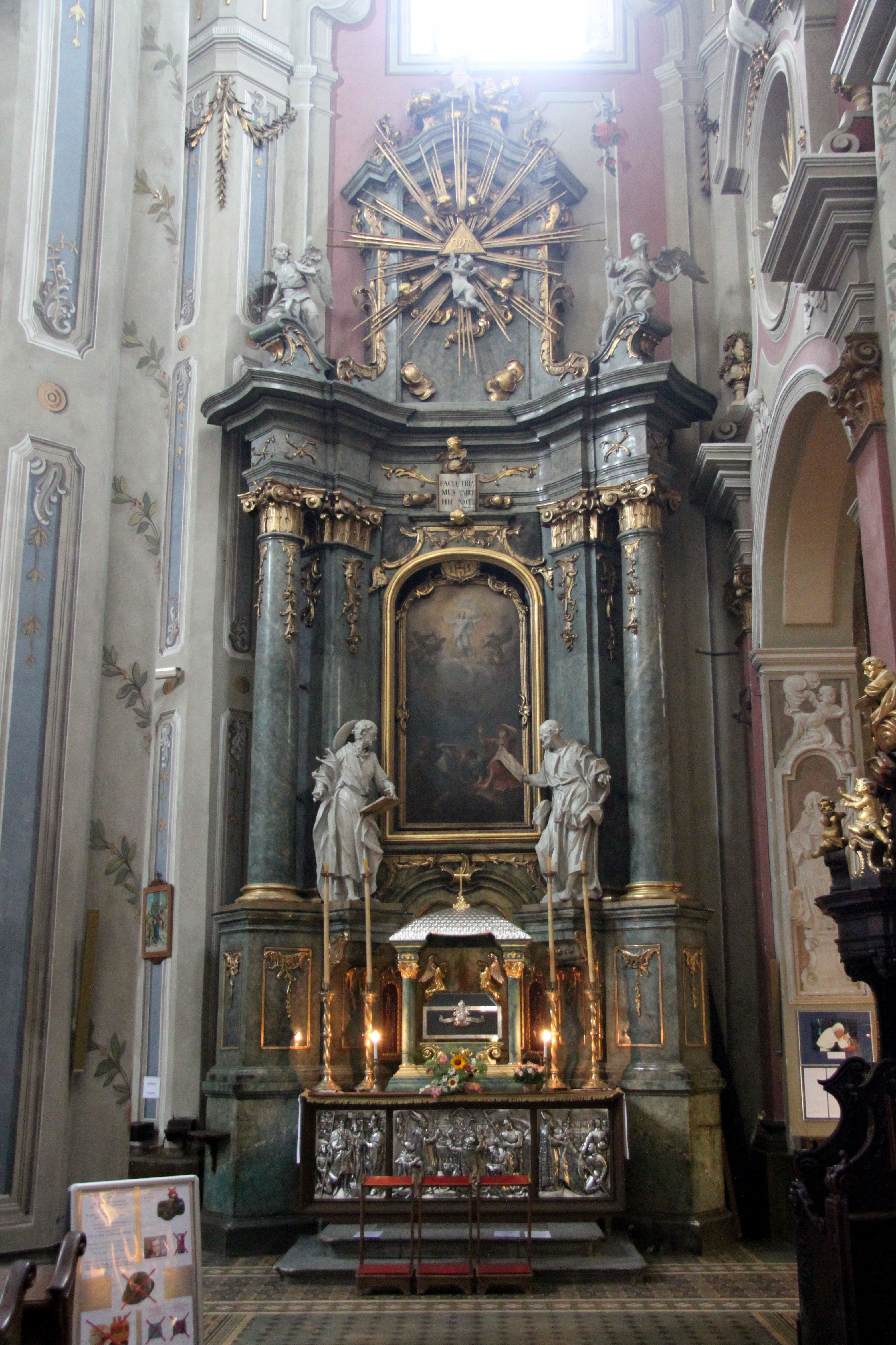 собор Кафедральний, Катедральна пл., 1, Львів